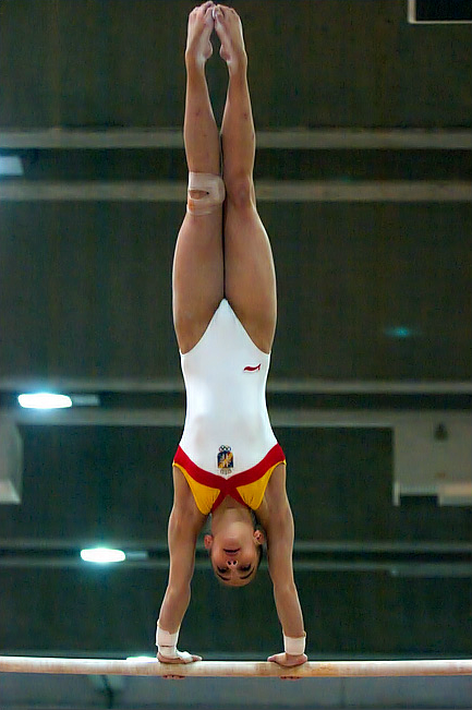 Patricia Moreno en las barras asimétricas durante el encuentro España - Holanda de gimnasia artística en Madrid en 2004.